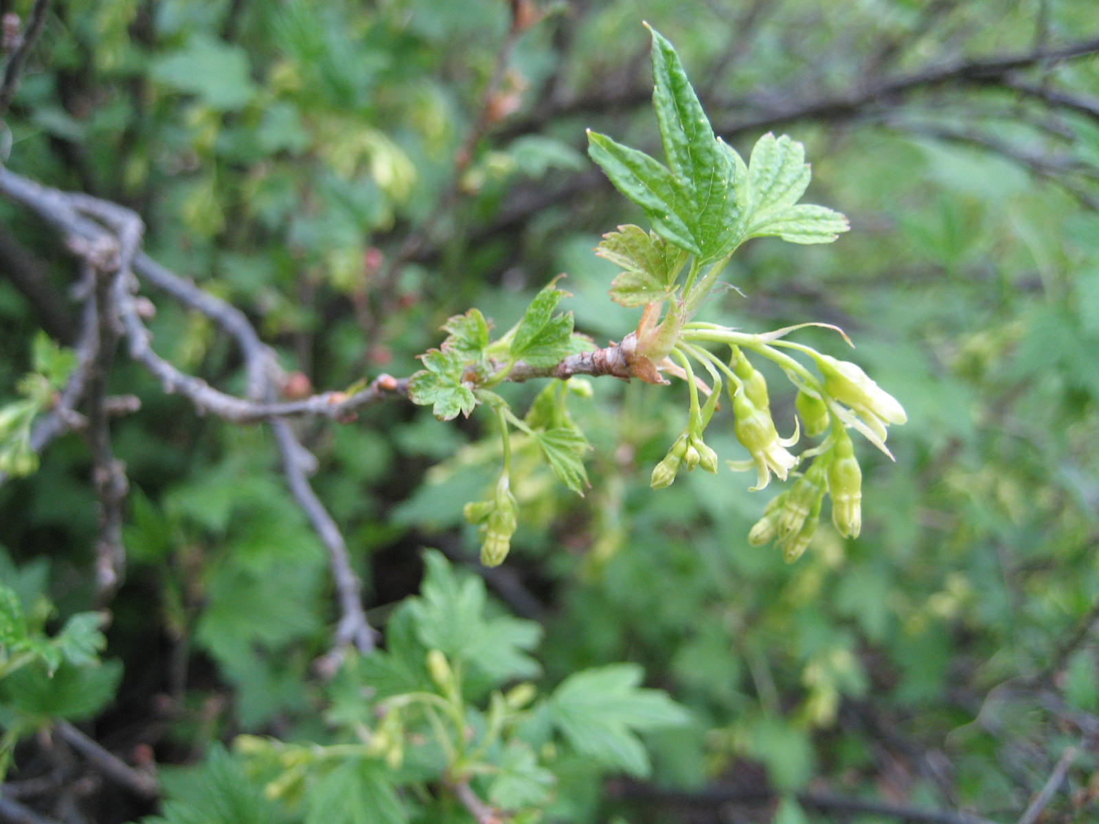 Ribes americanum - Blüte - Bot. Garten Berlin Dahlem